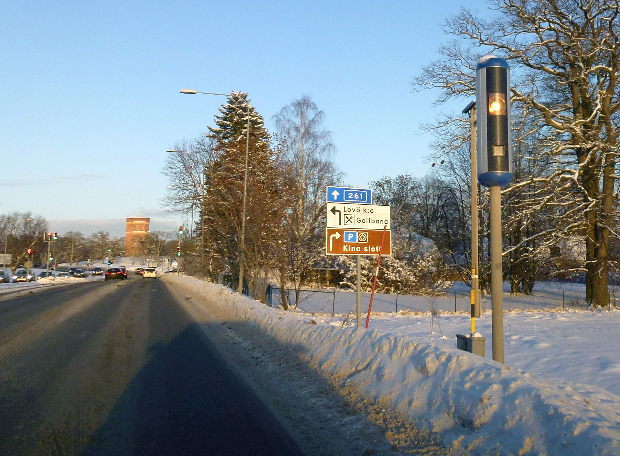 Fartkamera på Ekerövägen